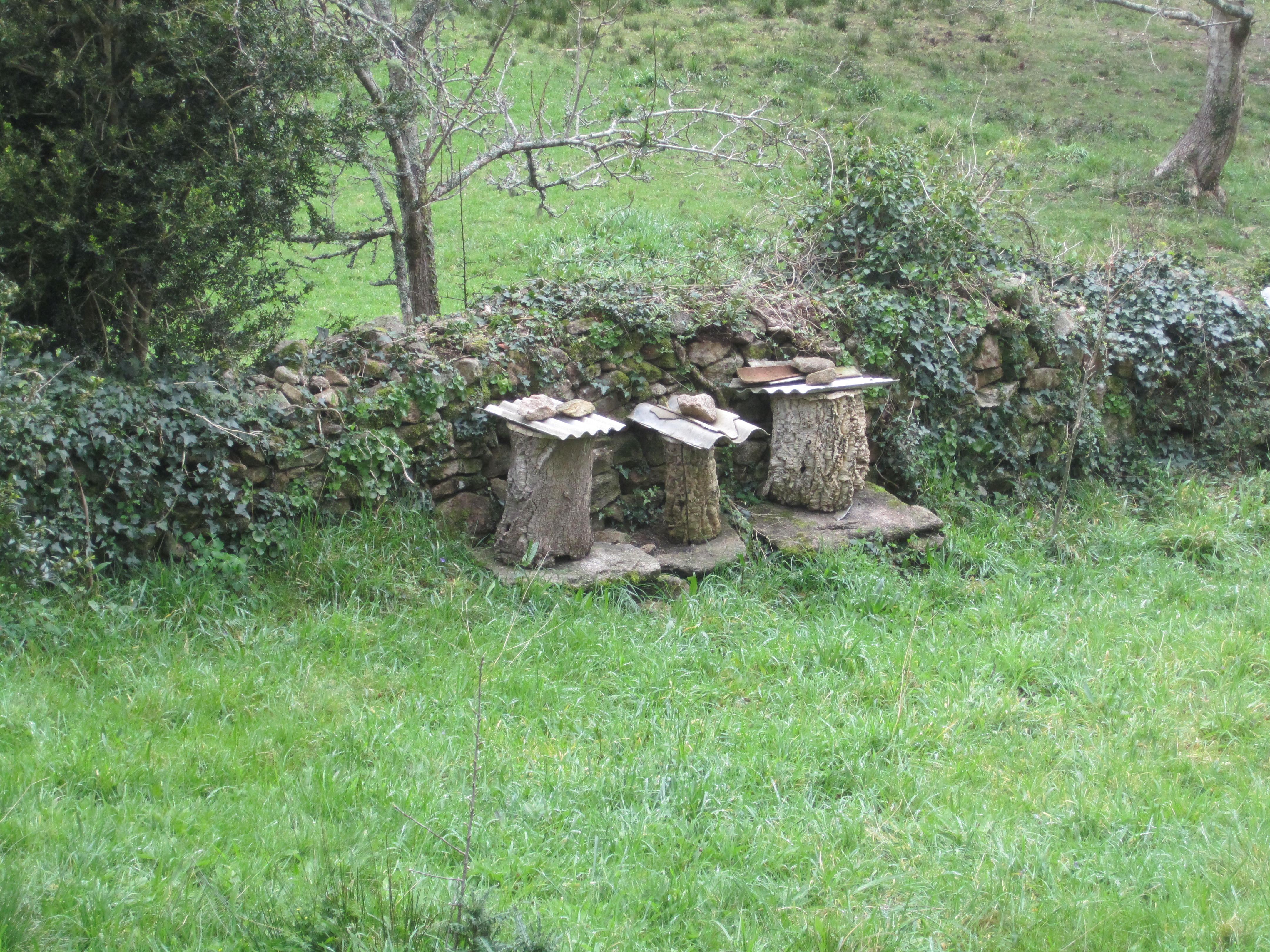 Colmeas tradicionais de Galiza no Monte Pindo